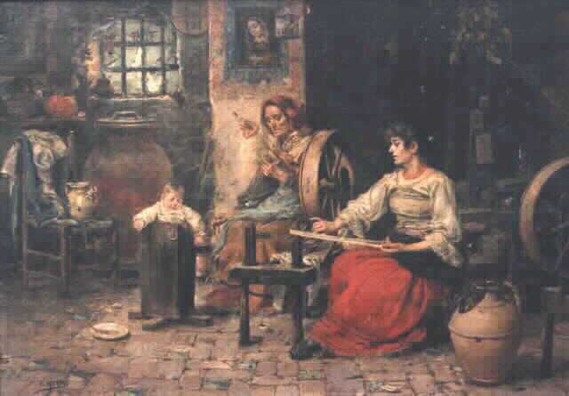 Vicente March (1859 - 1927) - Las tres edades Fuente En el dominio público por antigüedad